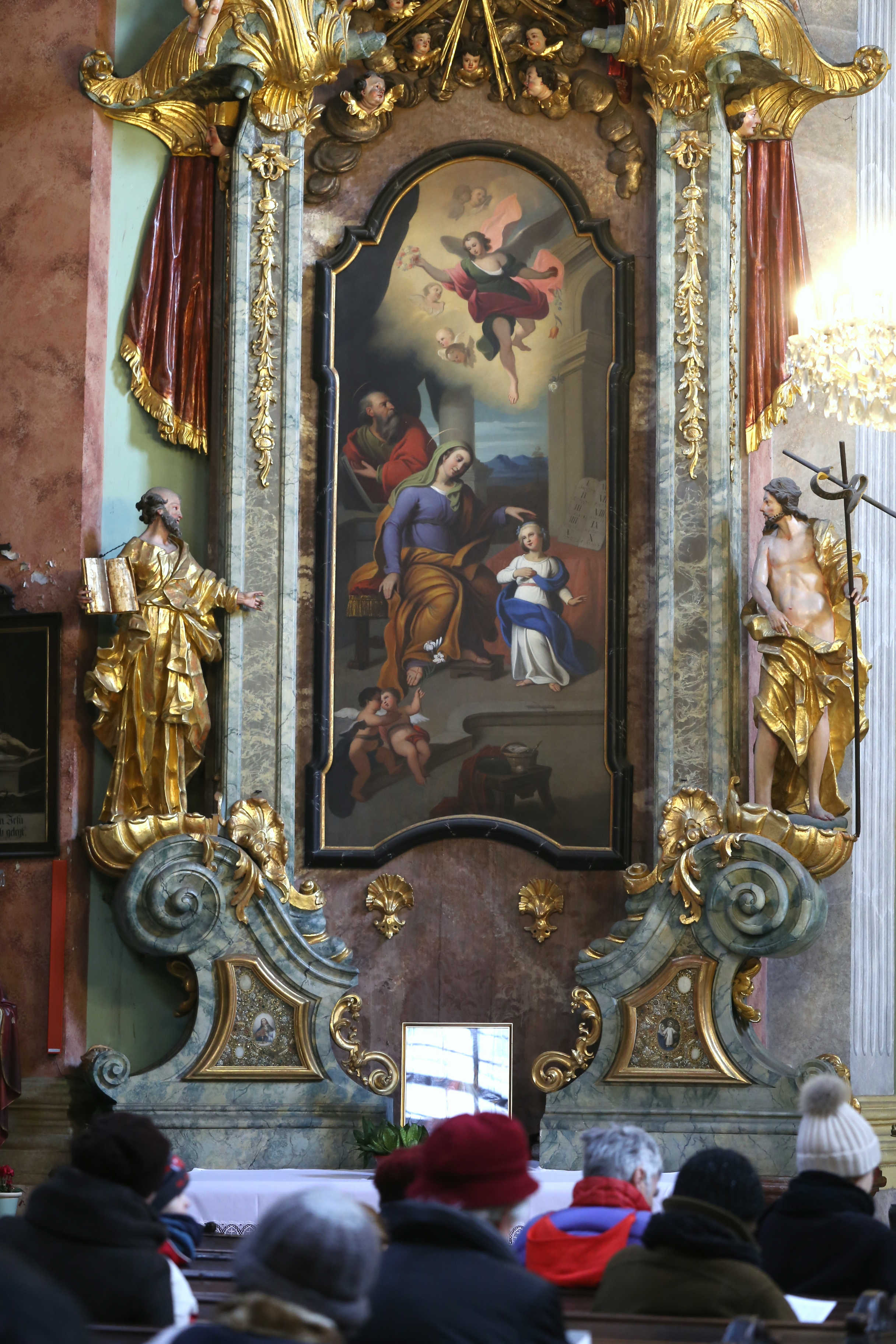 Szent Ferenc Sebei temploma, Budapest, Batthyány tér. Szent Anna-oltár, Schöfft József Károly: Szent Anna a gyermek Máriát tanítja, a háttérben balra Szent Joachim áll c. oltárkép. Balra Szent Jakab, jobbra Keresztelő Szent János szobra